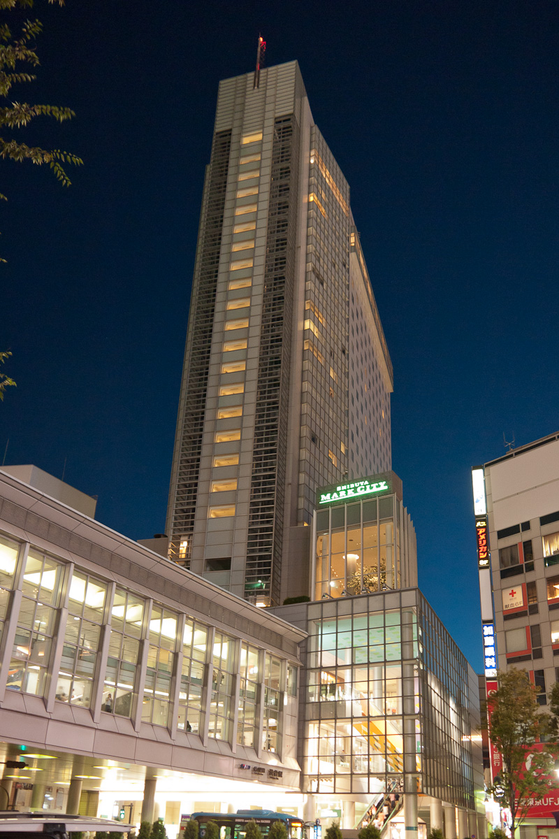 渋谷マークシティ・イースト、井の頭線渋谷駅入り口。